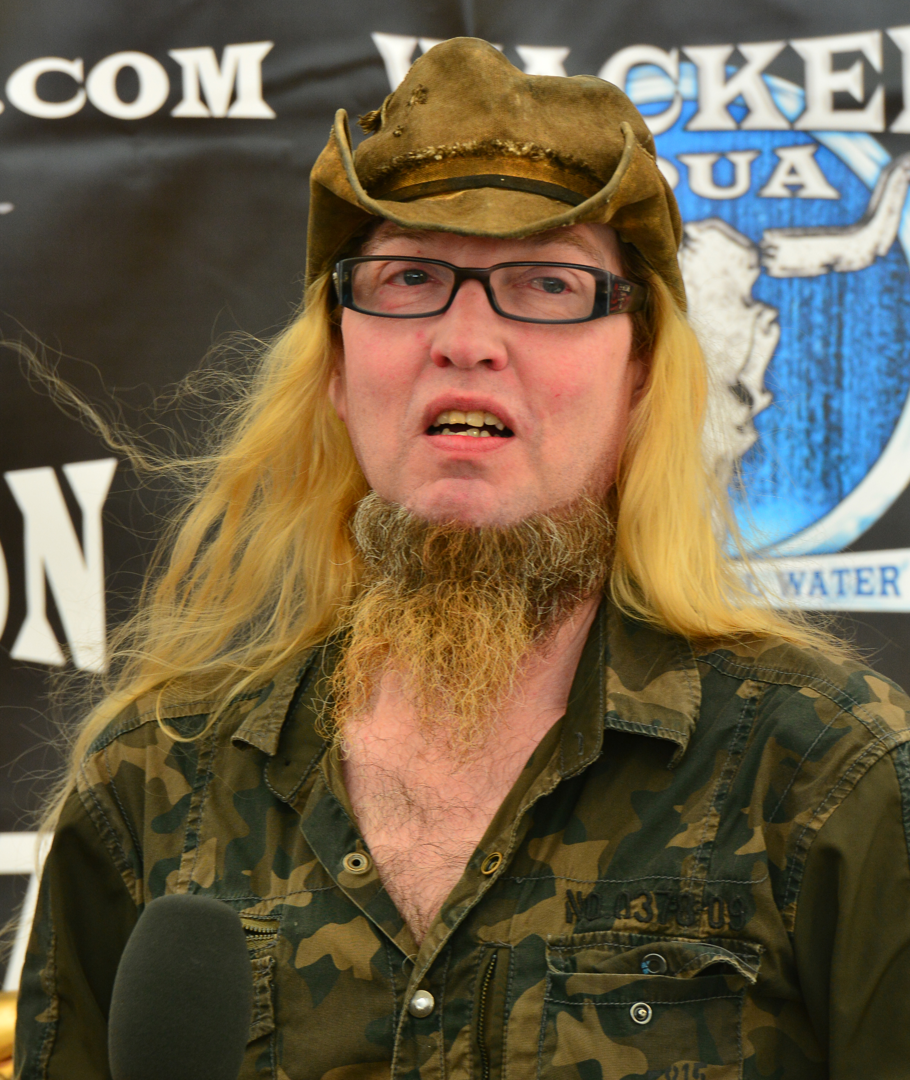 Warrel Dane bei einer Pressekonferenz beim Wacken Open Air 2014